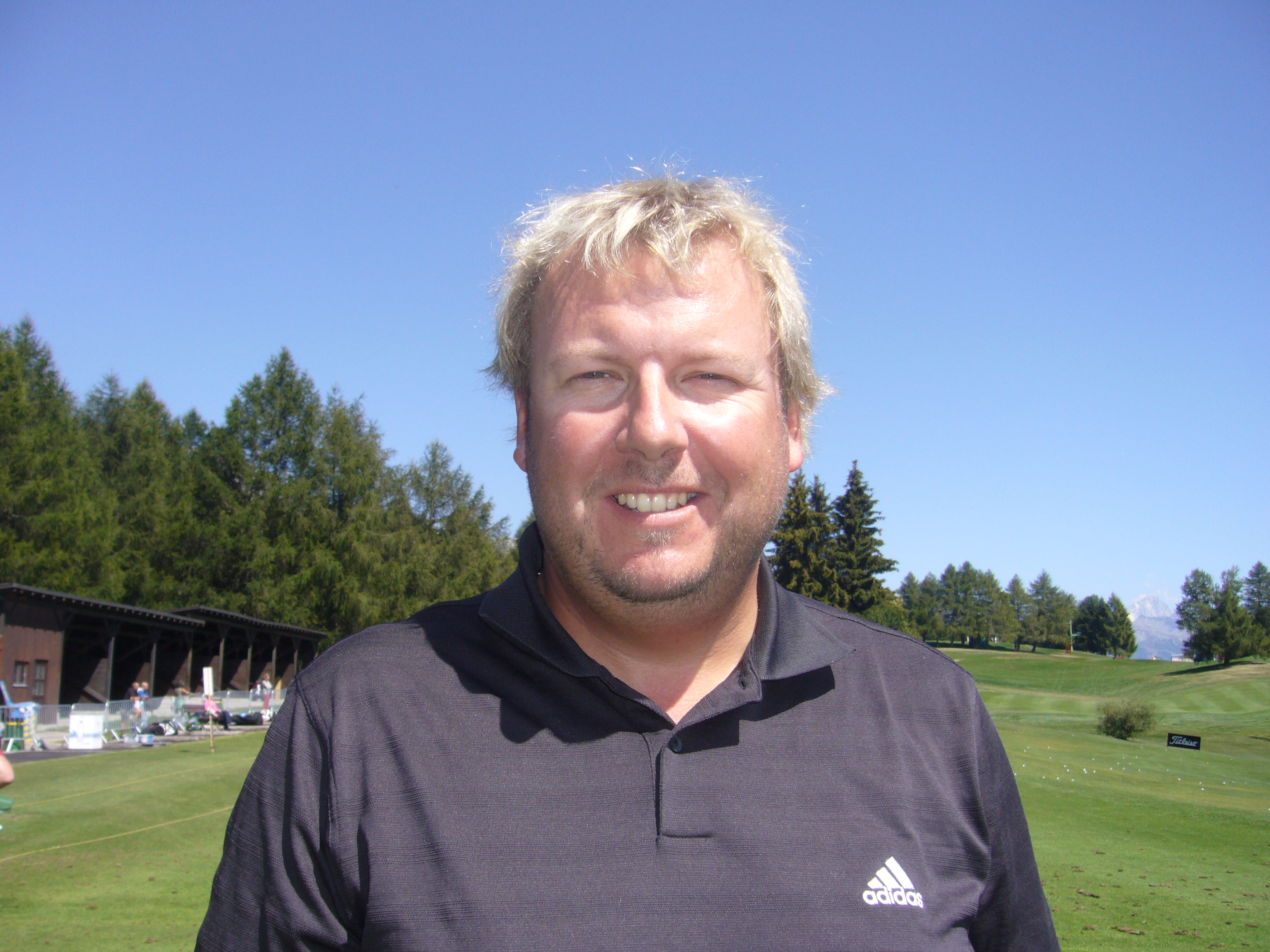 Michael Jonzon at European Masters in Crans